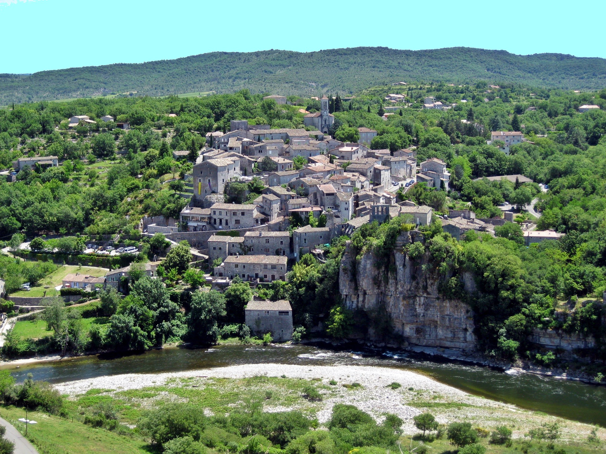 Balazuc / Ardèche © by Besenbinder